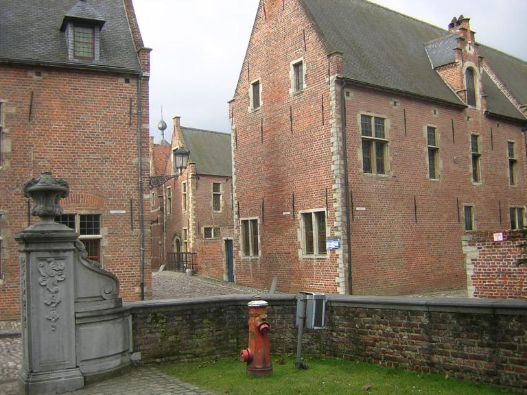 Hoekje in het Begijnhof van Leuven.